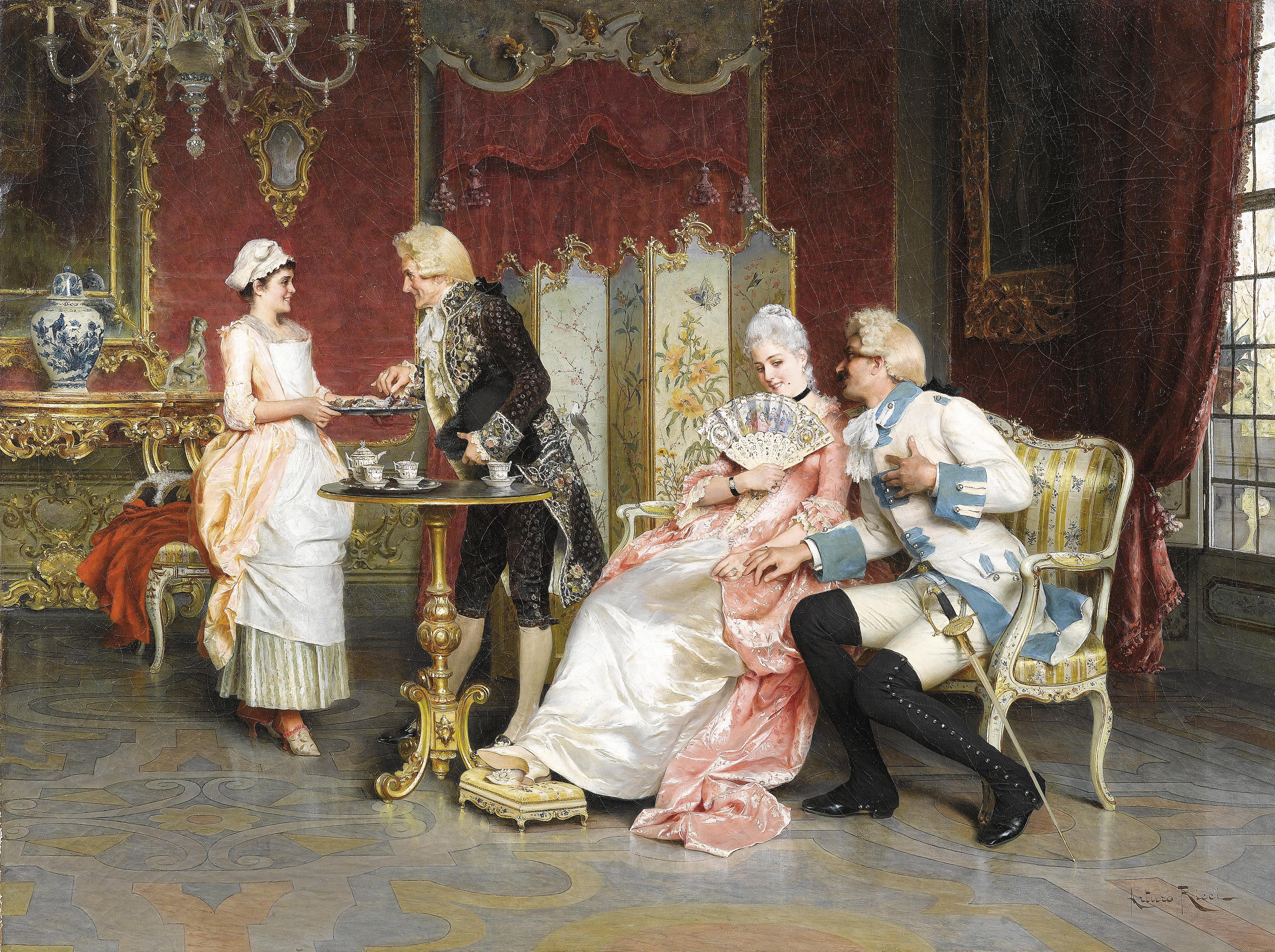 Nachmittagstee